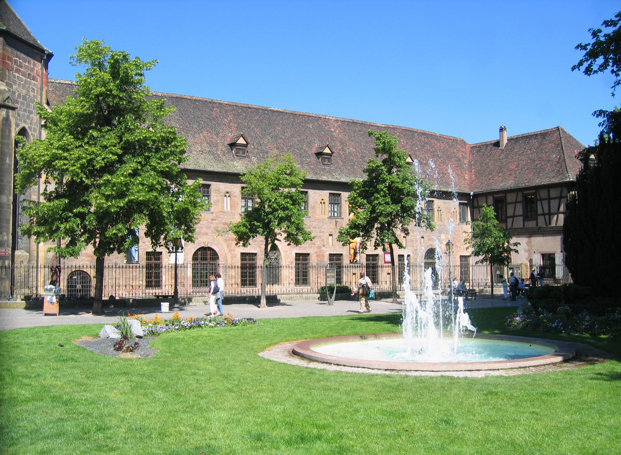 Le Musée d'Unterlinden